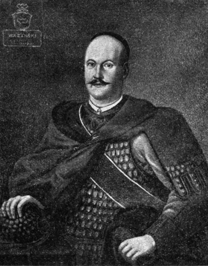 Беларуская (тарашкевіца): Партрэт Антонія Важынскага (Antoni Važynski)